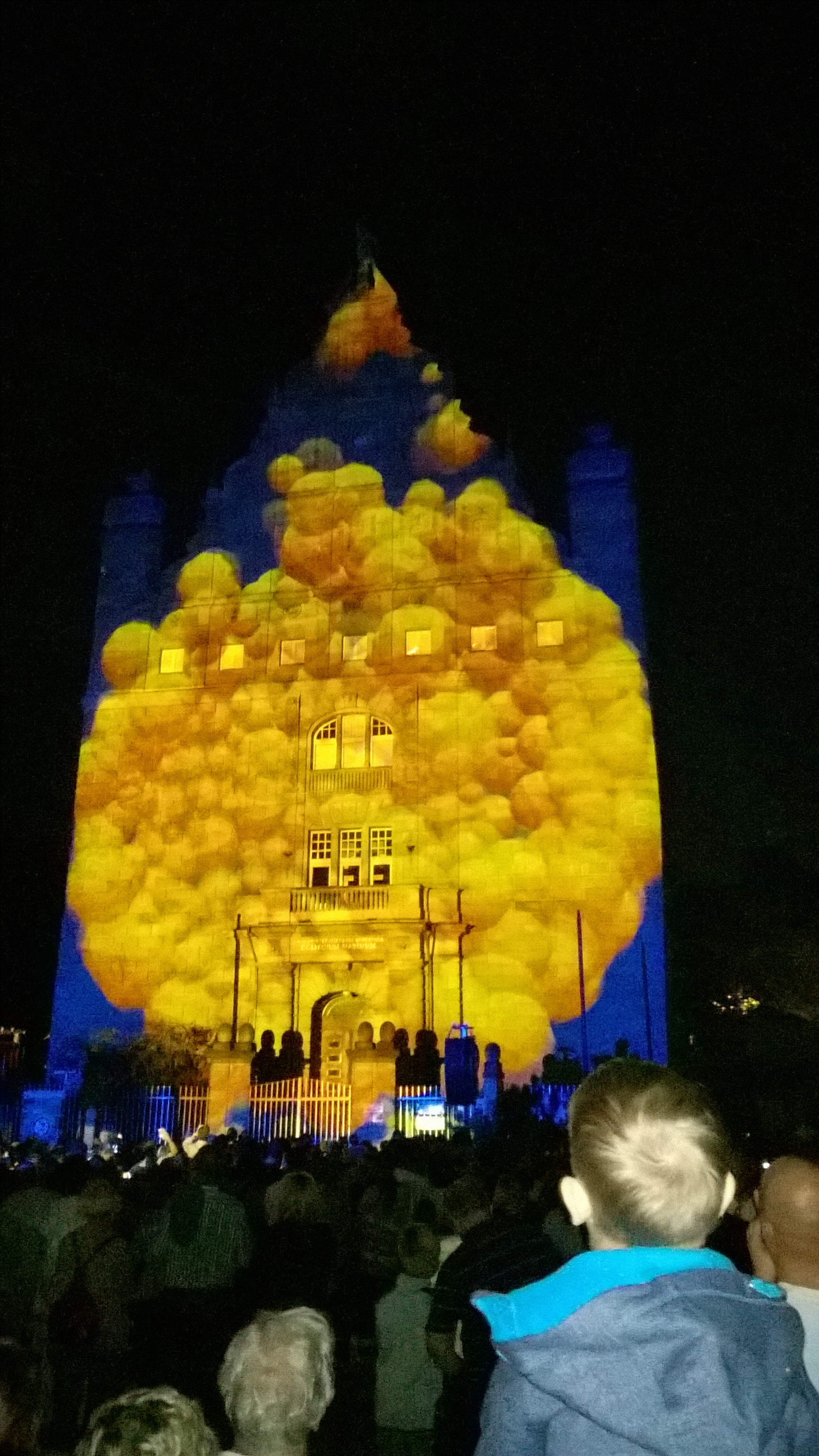 Projekcja "Stratum" na budynku Collegium Maximum UMK podczas Festiwalu Światła SKYWAY w 2015 roku